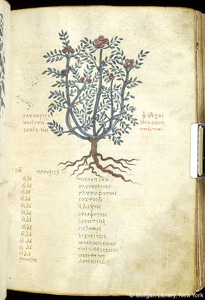 liquorice: Pierpont Morgan Dioscorides f. 28r